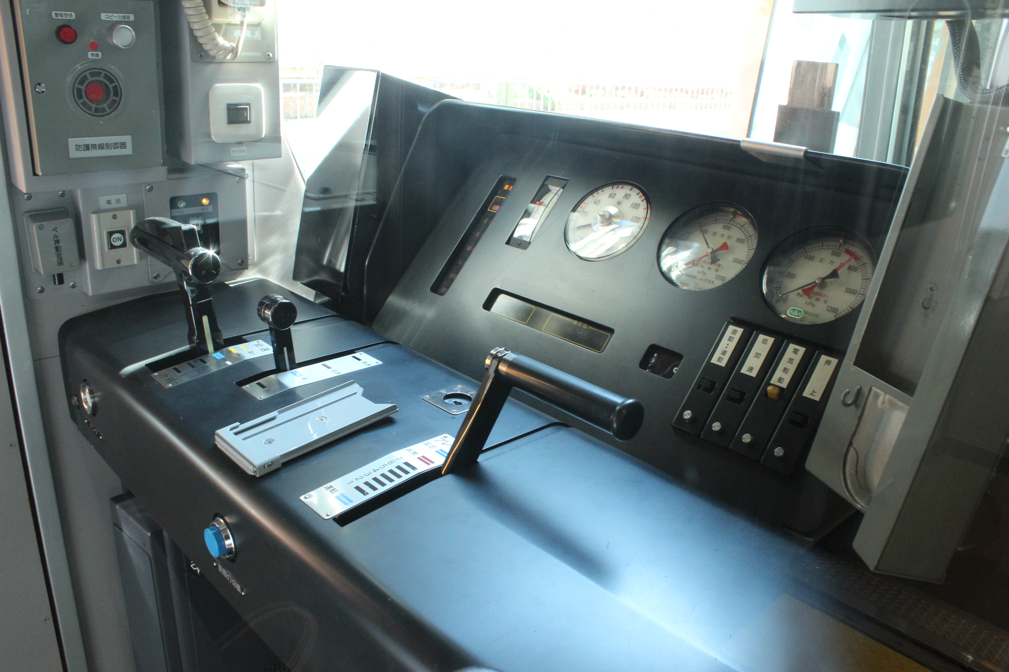 22600系運転台